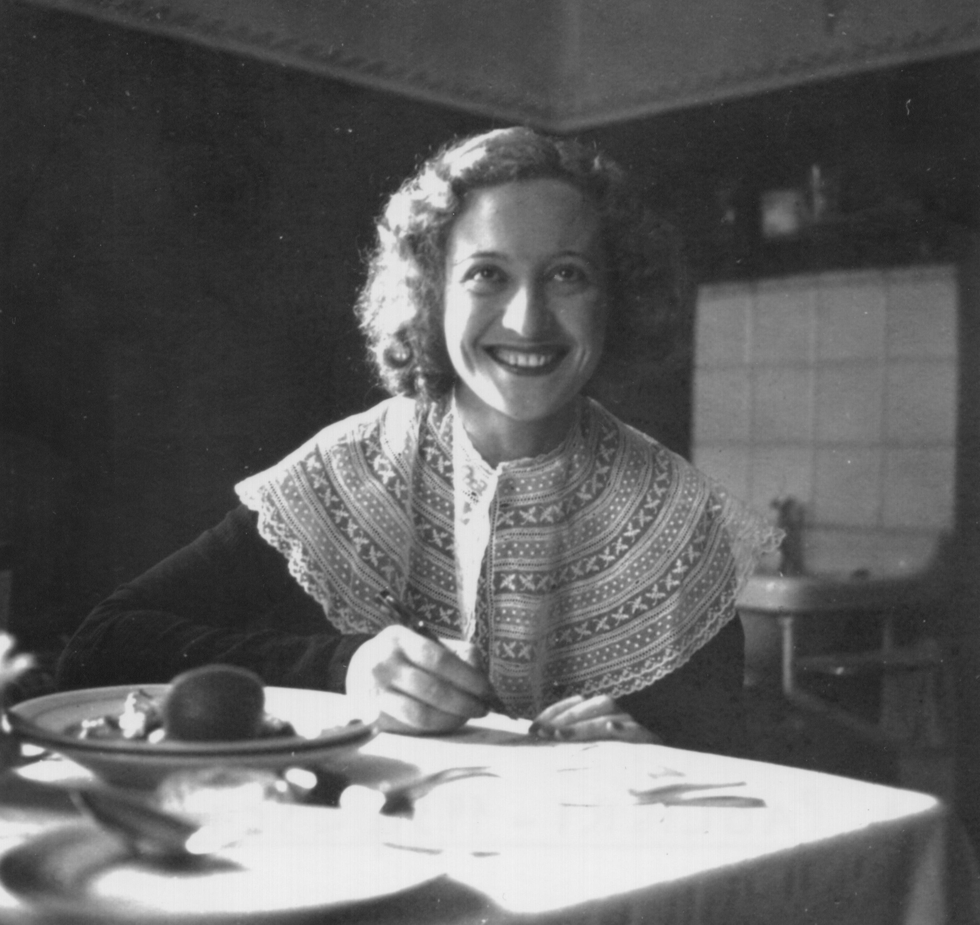 L'attrice Germana Paolieri a Sciacca.